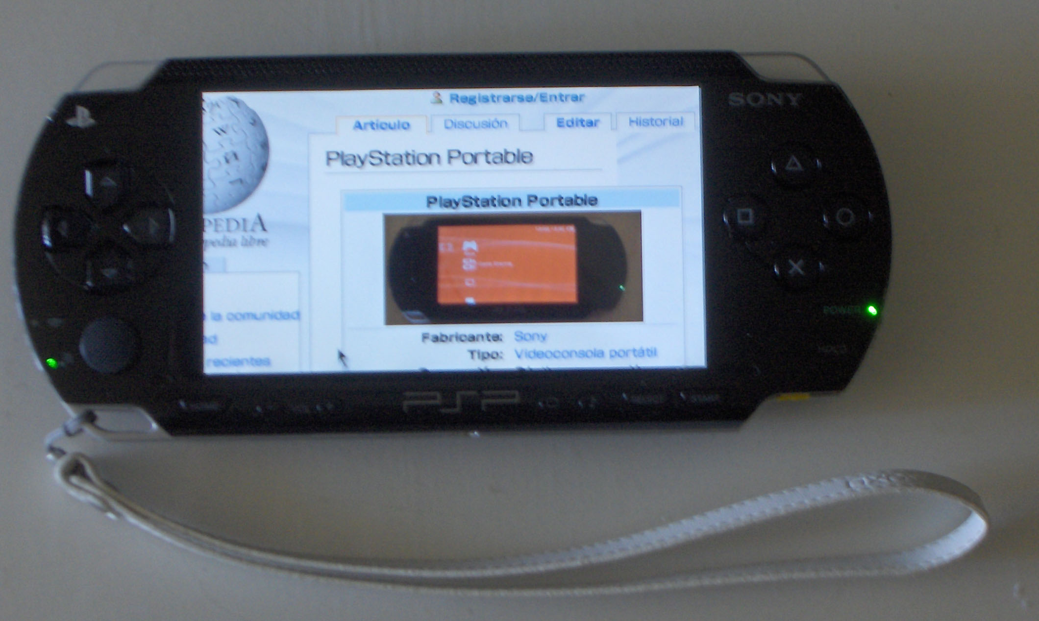 Una foto de mi PSP con la Wikipedia en español en el navegador